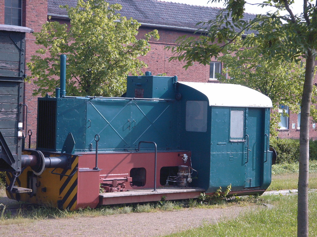 Stolberg, Zinkhütter Hof, Fabrikantenvilla